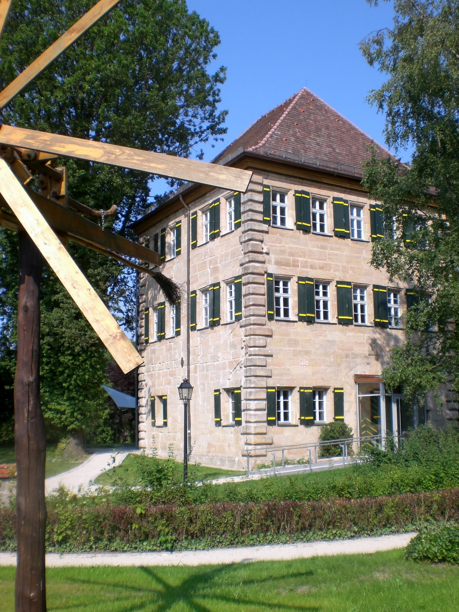 Markt Feucht, Zeidlerschloss